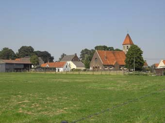 Dorpzicht Gottem